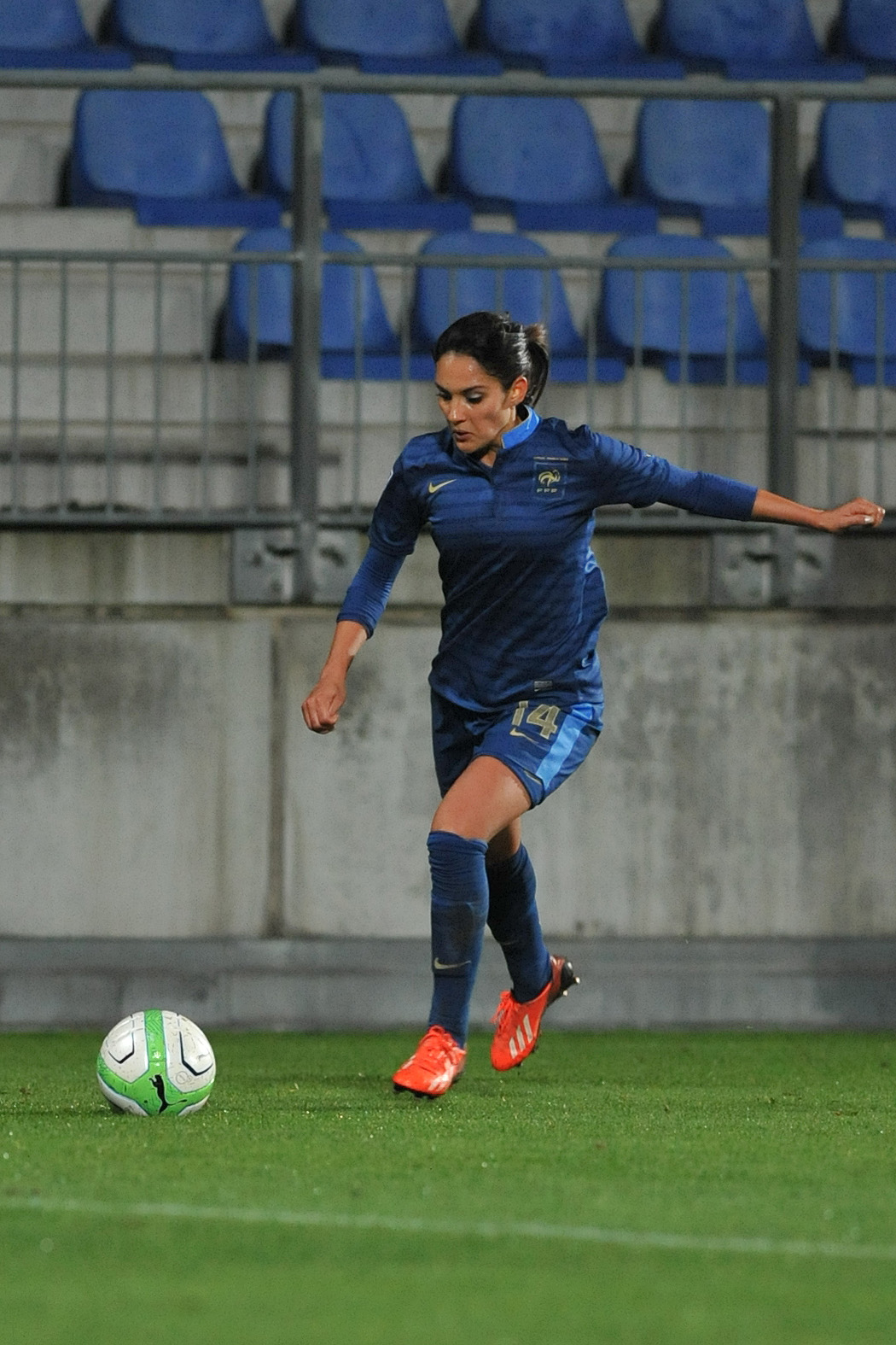 FIFA Women's World Cup 2015 Qualiying Round Österreich - Frankreich am 31. Oktober 2013 in Ritzing: Louisa Necib